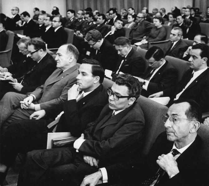 Zentralbild Spremberg 18.10.68 bi-Pr. Berlin: Bedeutsame Sitzung des Staatsrates zur weitern Entwicklung der sozialistischen Kultur am 18.10.68. Aufmerksam verfolgten die als Gäste an der 13. Sitzung des Staatsrates teilnehmenden Künstler, Schriftsteller, Kulturschaffende und Vertreter des öffentlichen Lebens die Diskussionsbeiträge namhafter Angehöriger der sozialisitschen Intelligenz, die aus ihrer Sicht, gestützt auf ihre Erfahrungen und getragen vonb ihrer Begeisterung für die Entwicklung einer sozialistischen Nationalkultur, ihre Gedanken darlegten, wie zum 20. Geburtstag der Republik die kultur zu noch höheren, vor aller Welt sichtbaren Erfolgen bei der Fromung sozialistischer Persönlichkeiten geführt werden kann. Auf unserem Foto vorn, v.r.n.l. Bruno Apitz, Walter Heynowski, Gerhard Scheumann, Michael Tschesno-Hell.